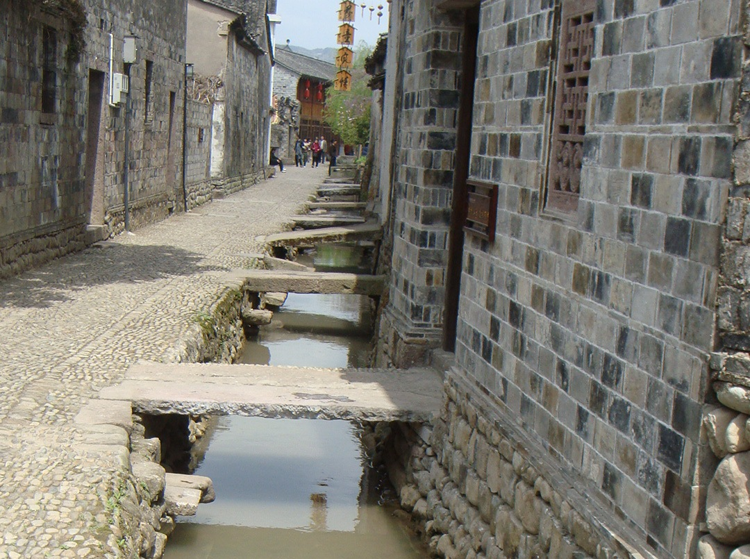 宁海前童古镇